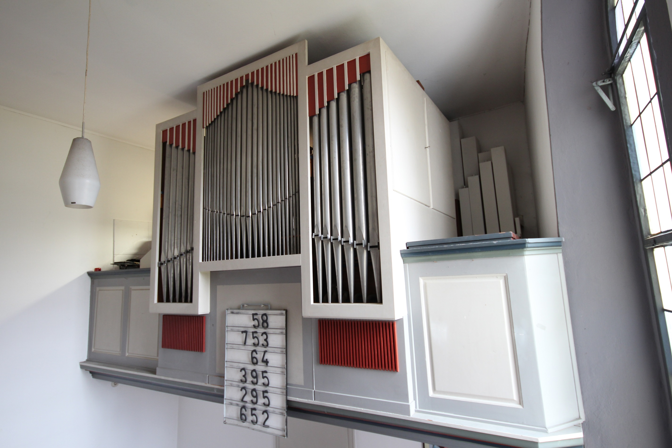 Prospekt der Hardt-Orgel der evangelischen Kirche Großrechtenbach zu Hüttenberg-Rechtenbach